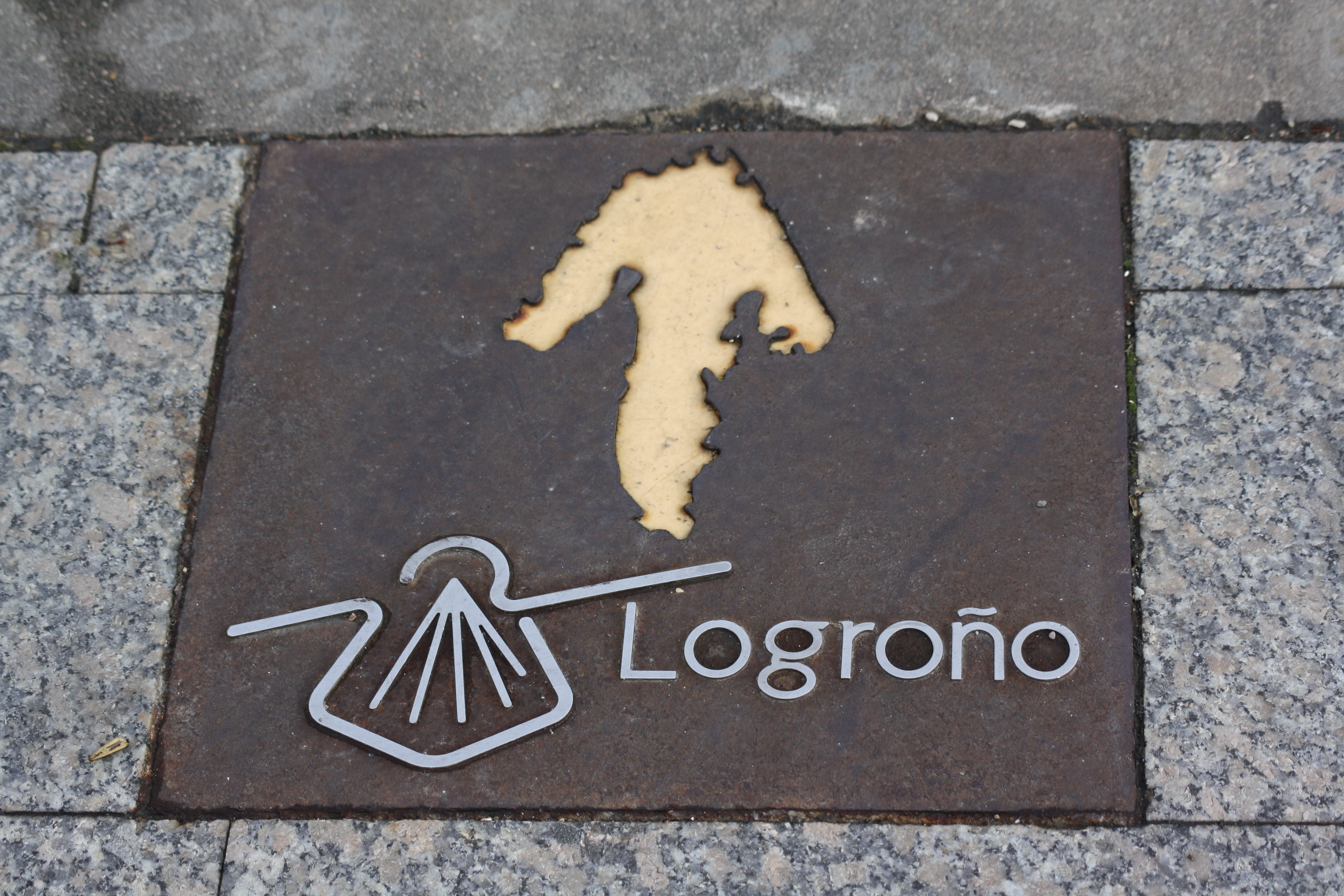 Logrono Camino Santiago señal